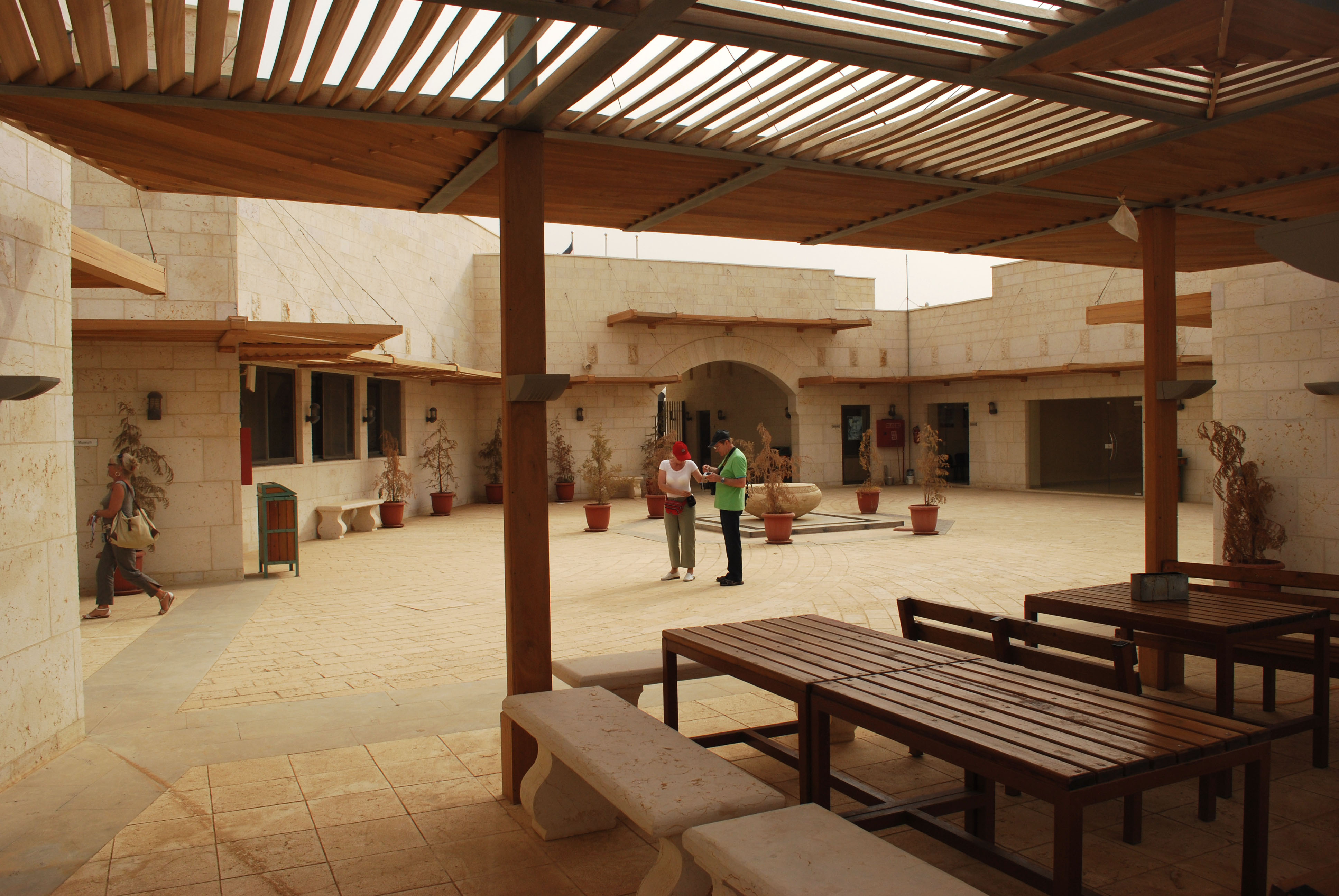 Le centre d'accueil touristique de Umm ar-Rasas.